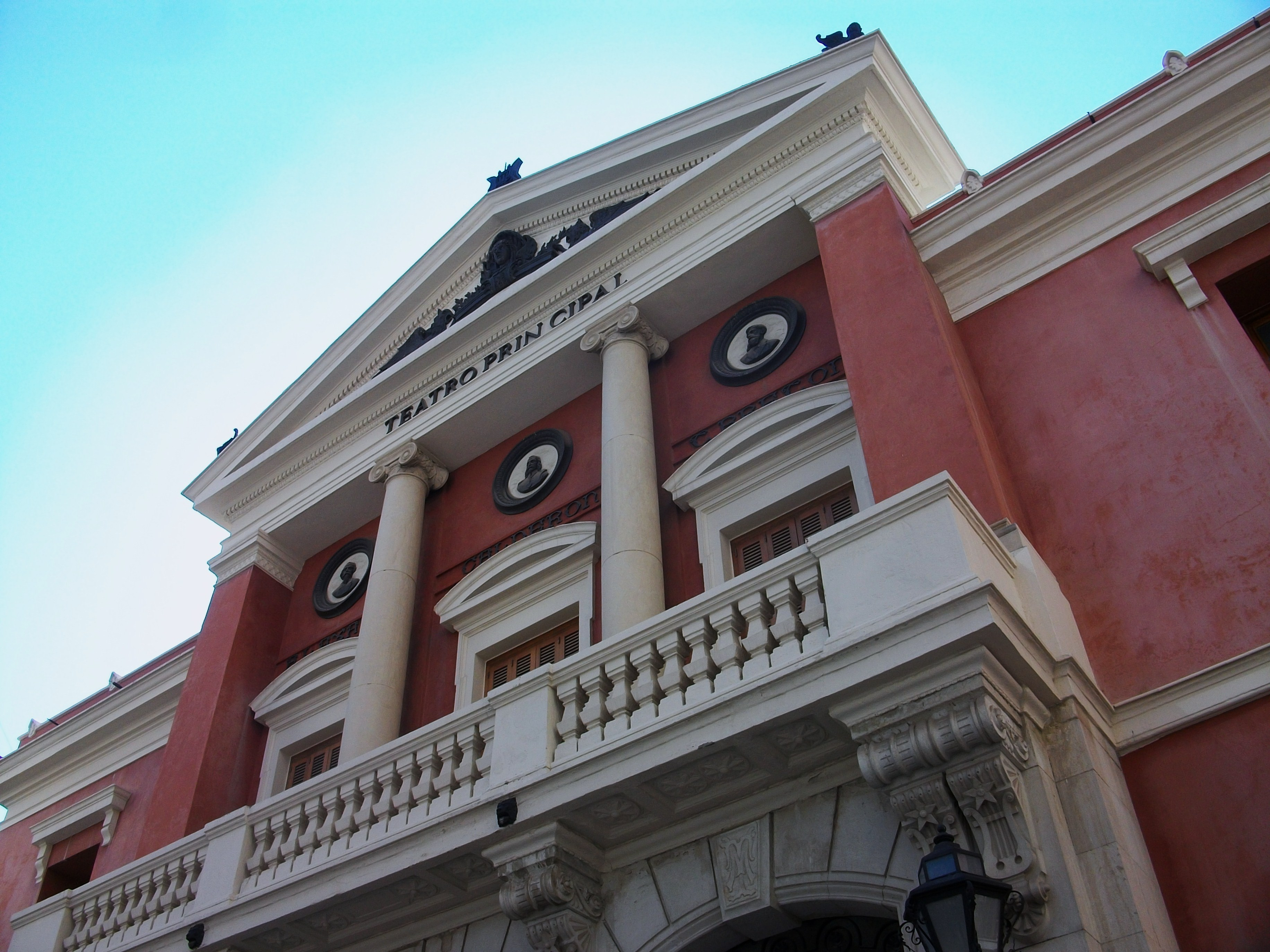 Teatre Principal de Castelló de la Plana.